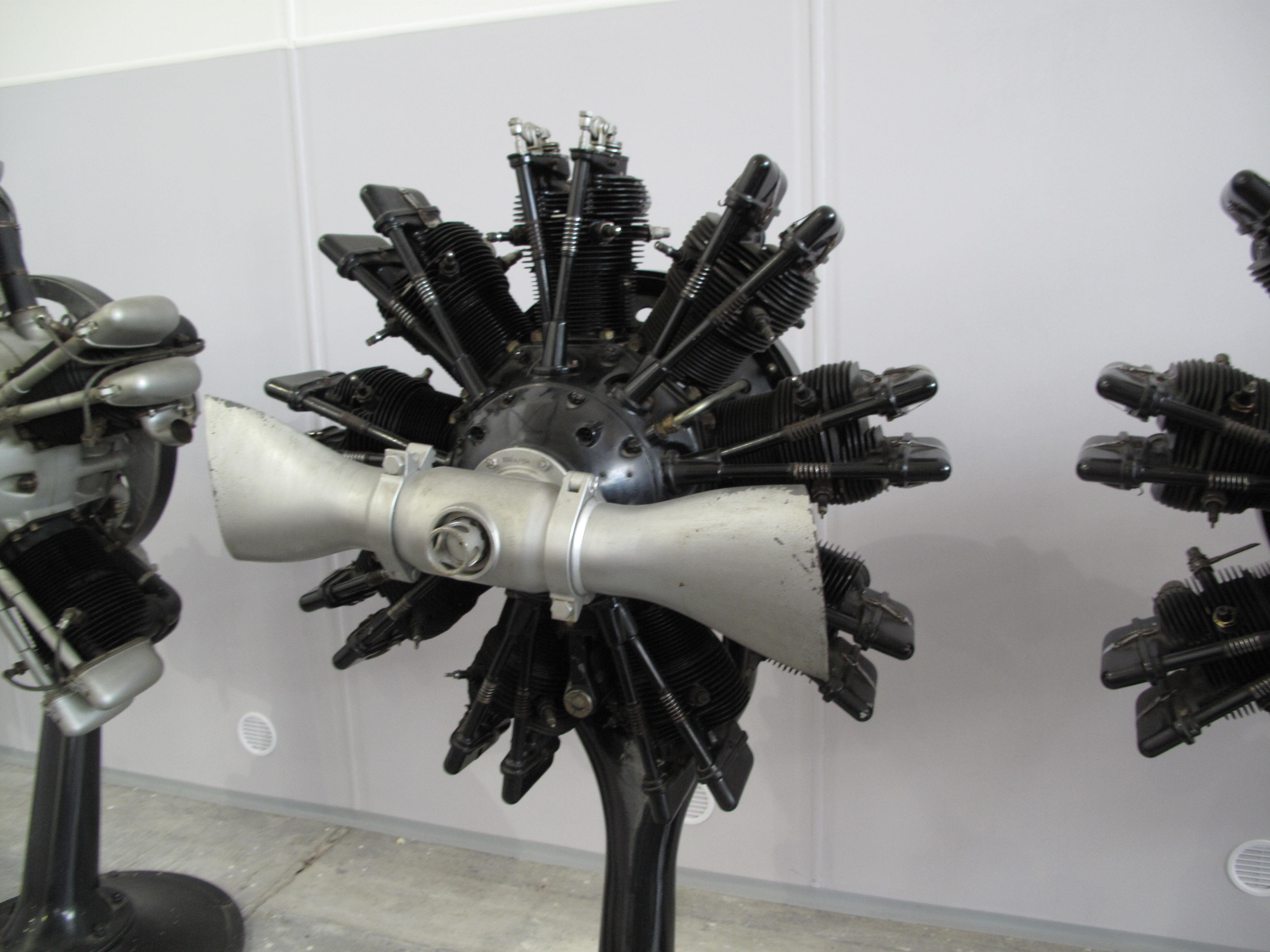 Letecké muzeum Kbely